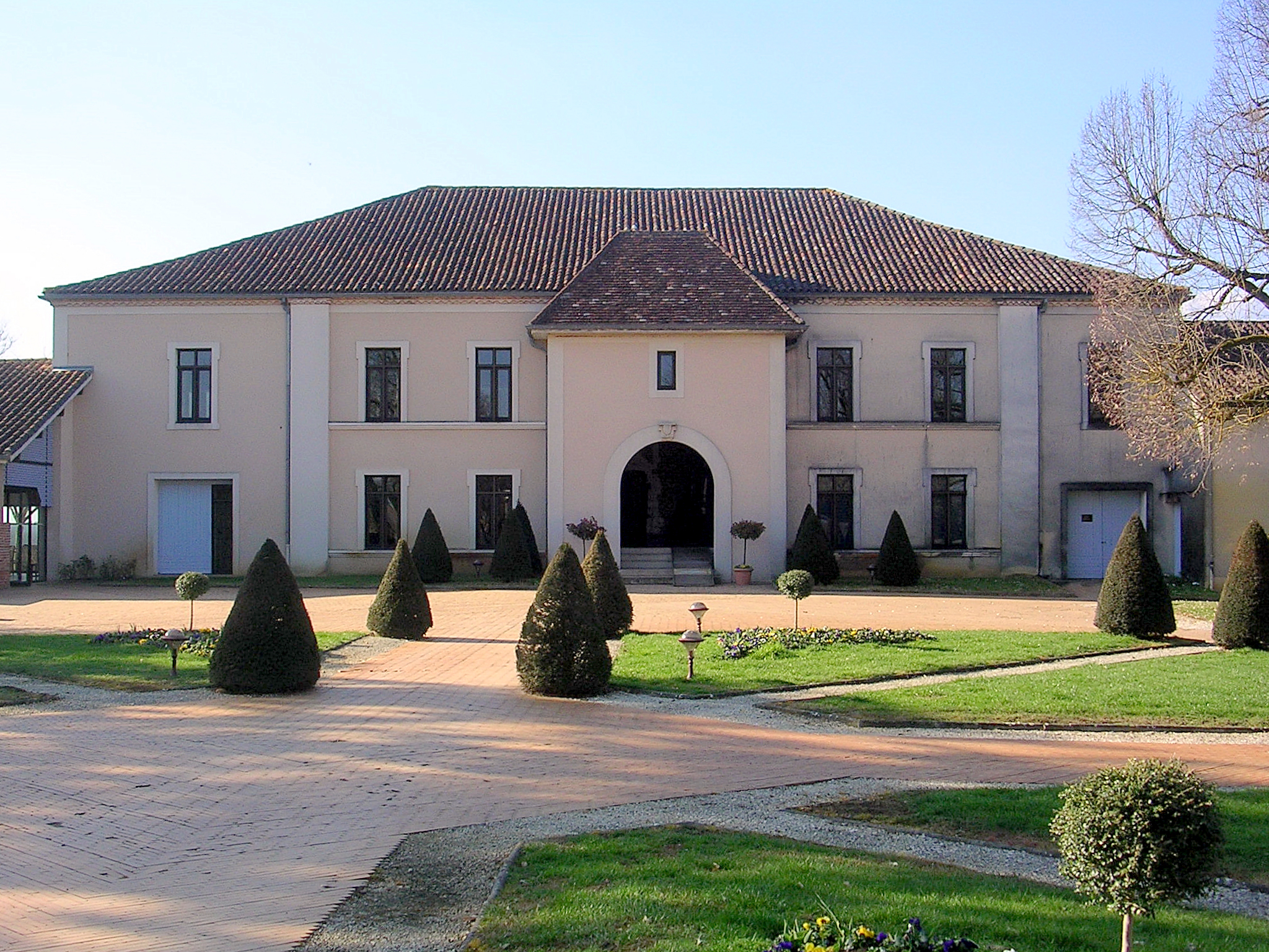 Domaine d'Ognoas, à Arthez-d'Armagnac, dans le département français des Landes